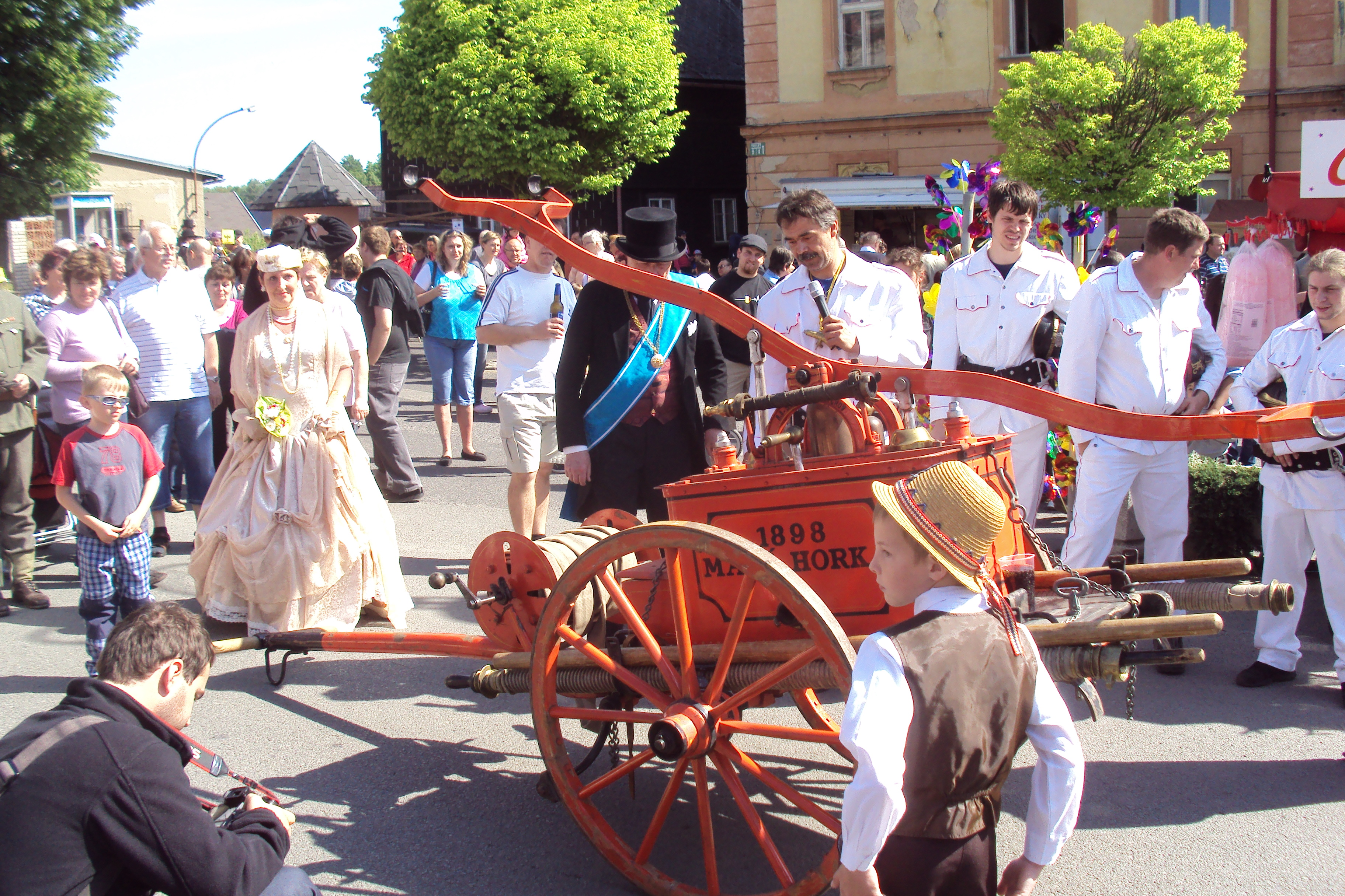 Hasiči z hasičského muzea v Novém Oldřichově přivezli starou stříkačku na zákupskou slavnost